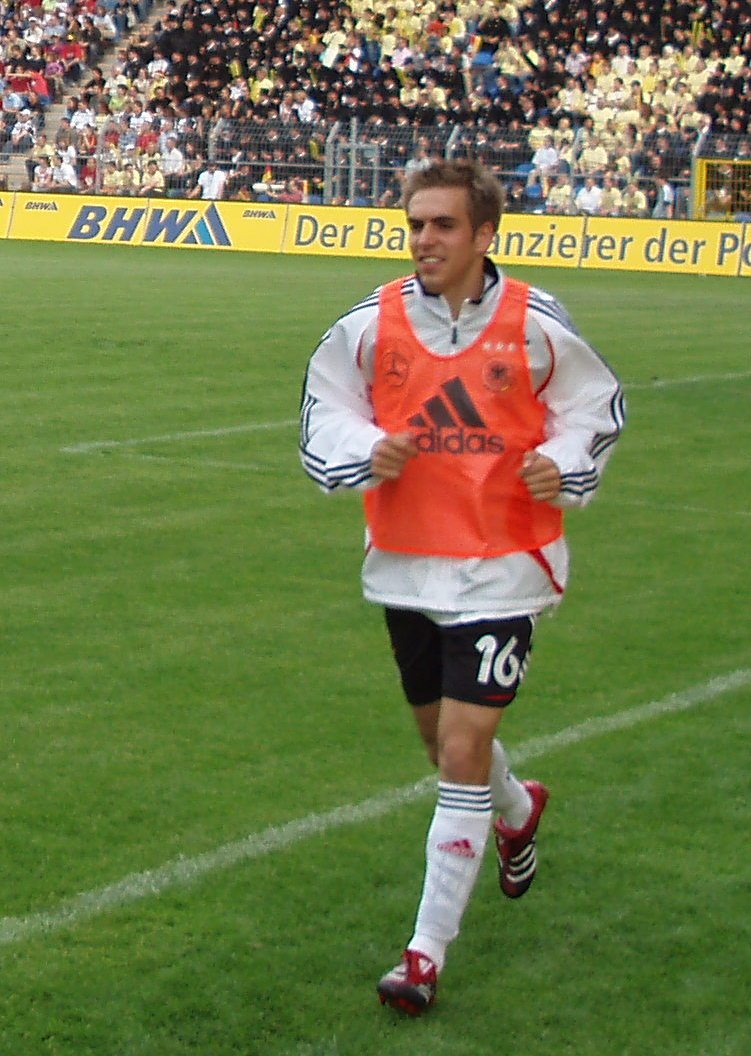 Philipp Lahm, Testspiel der deutschen Nationalmannschaft gegen den Verbandsligisten FSV Luckenwalde in Mannheim